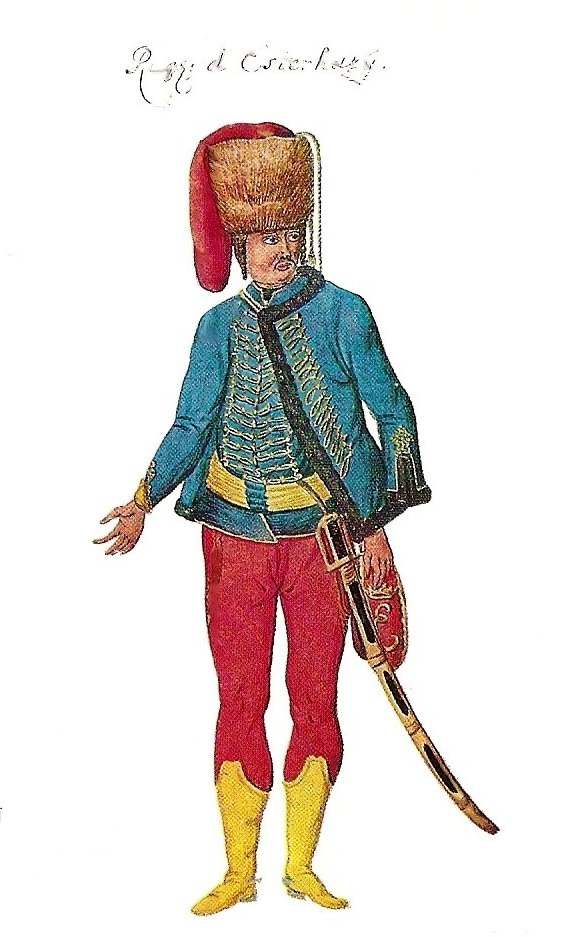 Kaiserliches Husarenregiment Esterhazy 1762 (H 5)